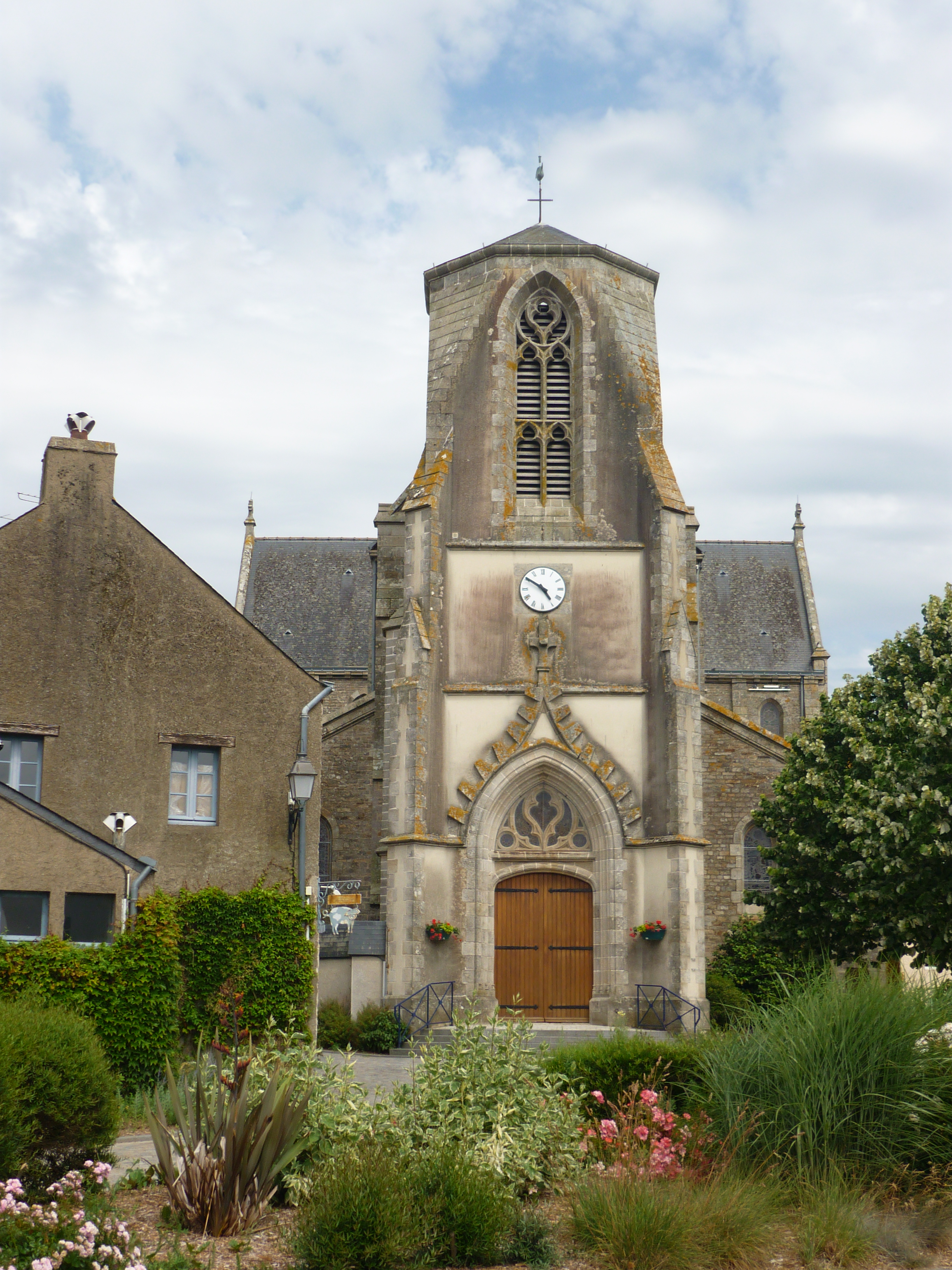 Eglise